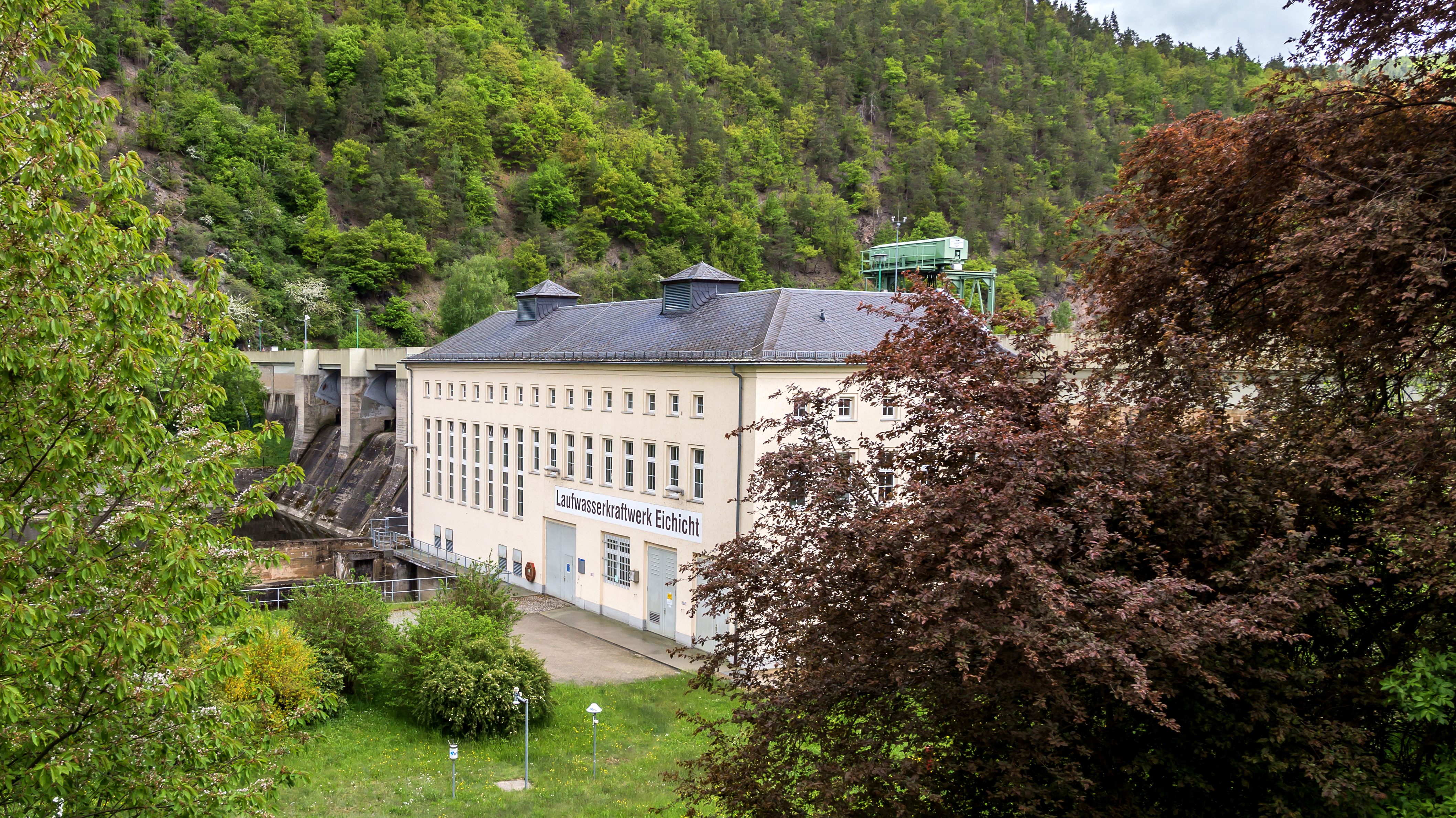 Eichicht Hohenwartener Straße Laufwasser-Kraftwerk (Bestandteil Wasserkraftanlagen an der Oberen Saale (Saale-Kaskade)